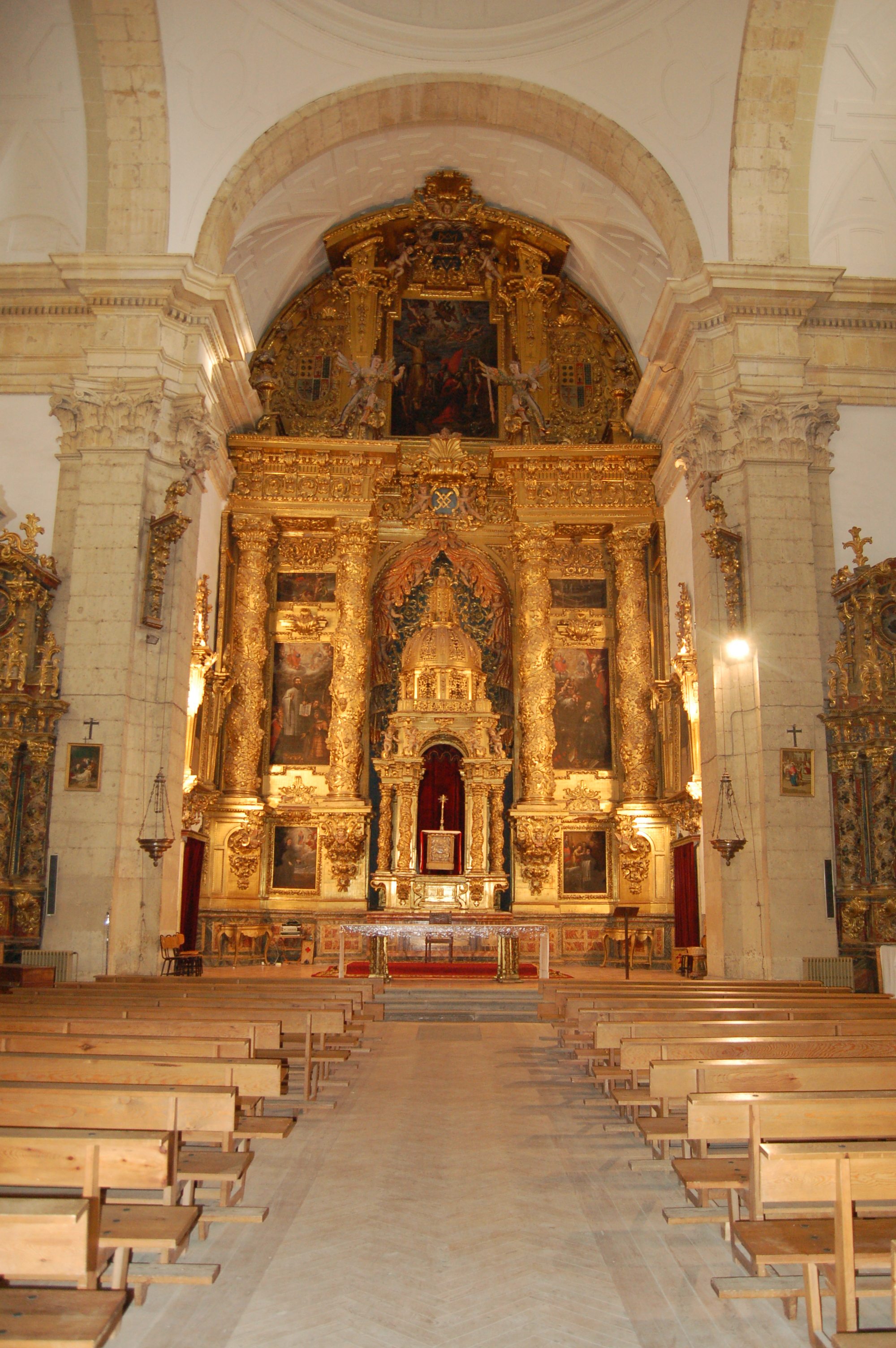 Interior de la iglesia del seminario (antigua Iglesia de la Compañia) de Segovia, con el retablo de José Vallejo Vivanco (1678)